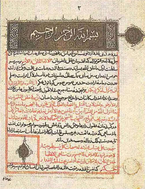 İbn Bîbî'nin el-Evâmirü'l-Alâiyye fi'l-umûri'l-Alâiyye isimli eserinin orijinal el yazmasının ilk sayfası.